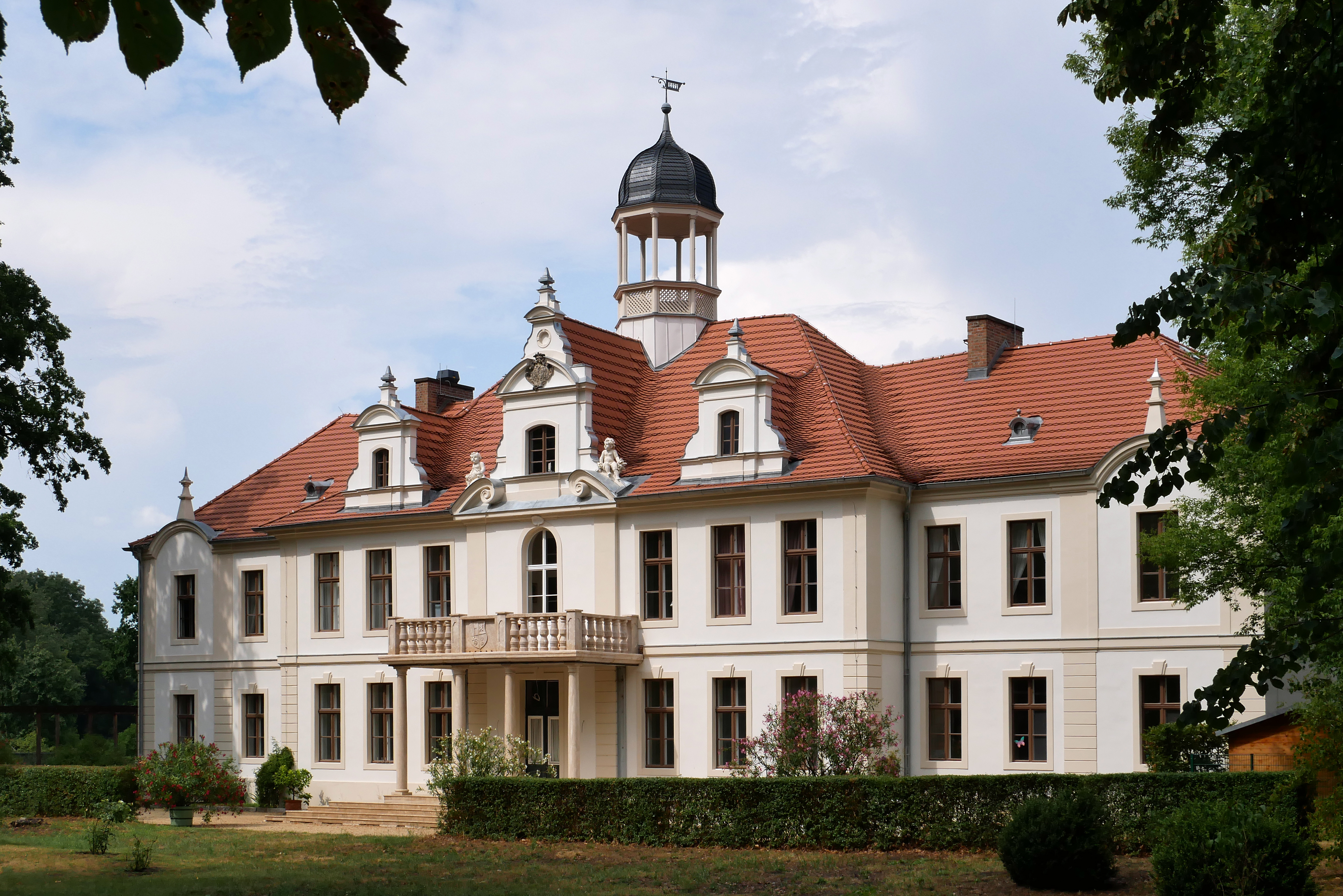 Karow liegt südöstlich von Genthin in Sachsen-Anhalt.